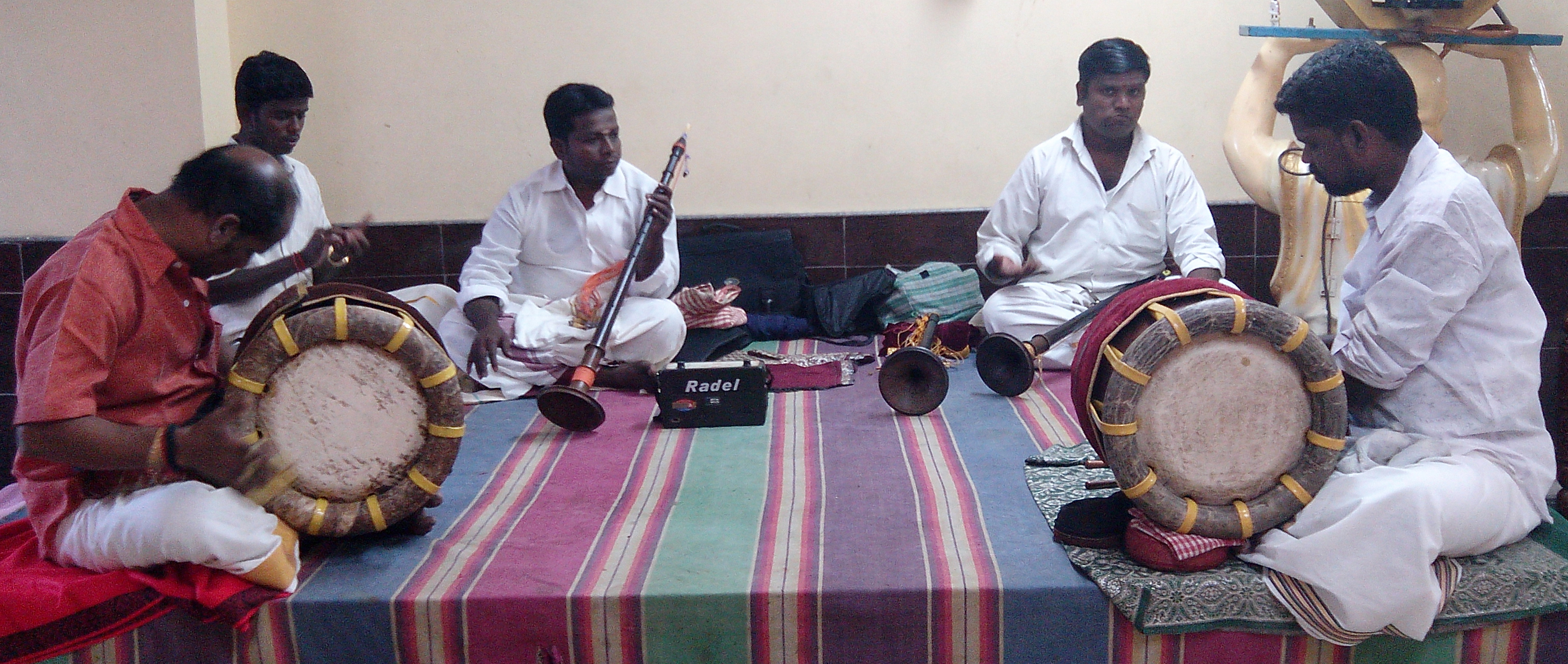 தமிழ் இசைக்குழு. சேலம், தமிழ்நாடு, இந்திய ஒன்றியம்.